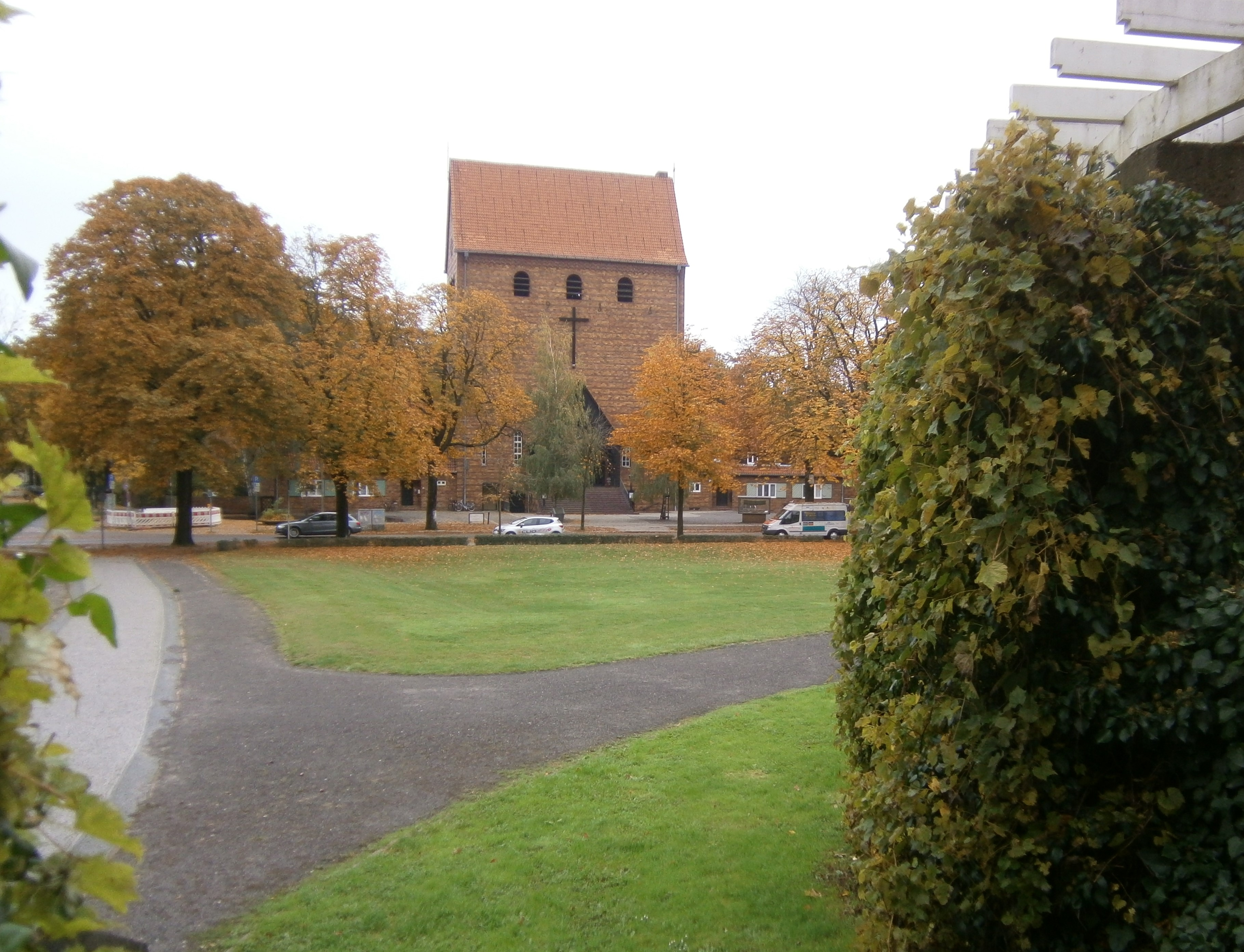 Zeltinger Platz ist ein Platz in Berlin-Frohnau. Hier der Blick über die zentrale Grünanlage zur evangelischen Kirche.